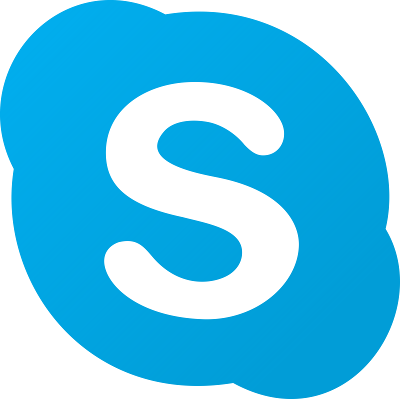 Anwendungsicon von Skype